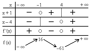 Figura realizada por M.Romero Schmidkte ✉, especialmente para la Enciclopedia Libre y para la Wikipedia.